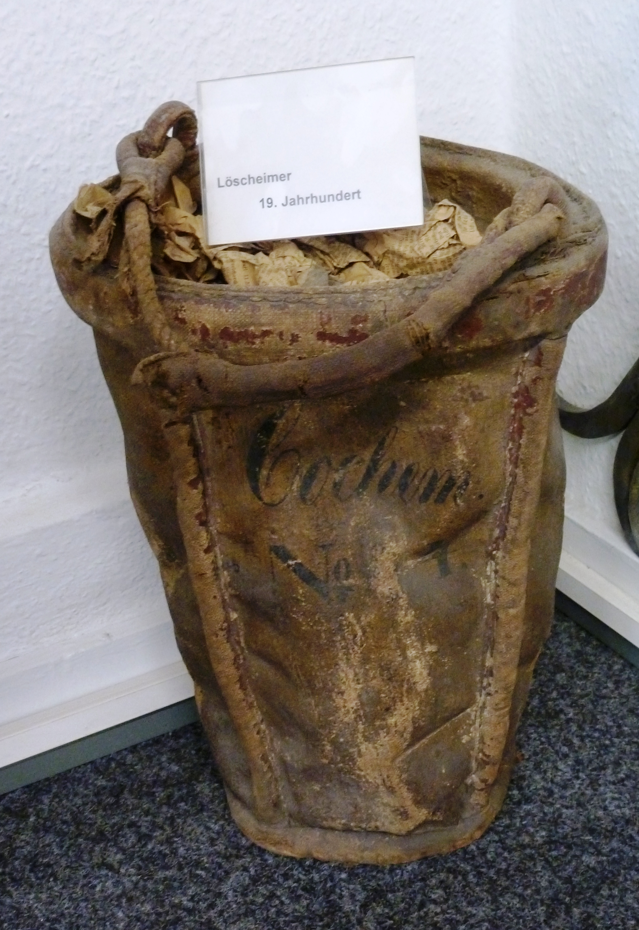 Historische Lehrsammlung der Berufsfeuerwehr Köln: Löscheimer aus dem 19. Jh.